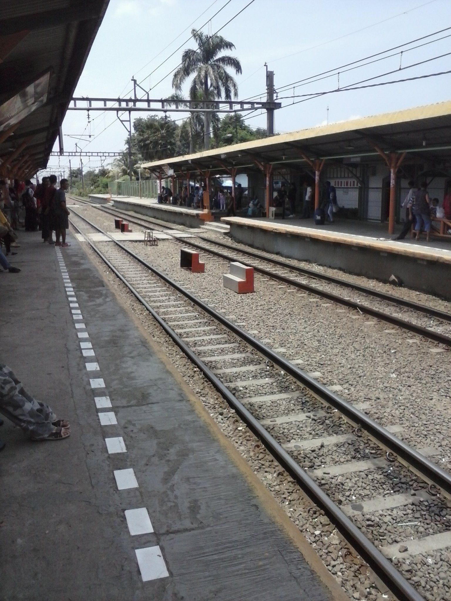 Gambar dari Stasiun Sudimara, mengarah ke Stasiun Rawabuntu. Diambil dari peron 2, menggunakan kamera telepon genggam.